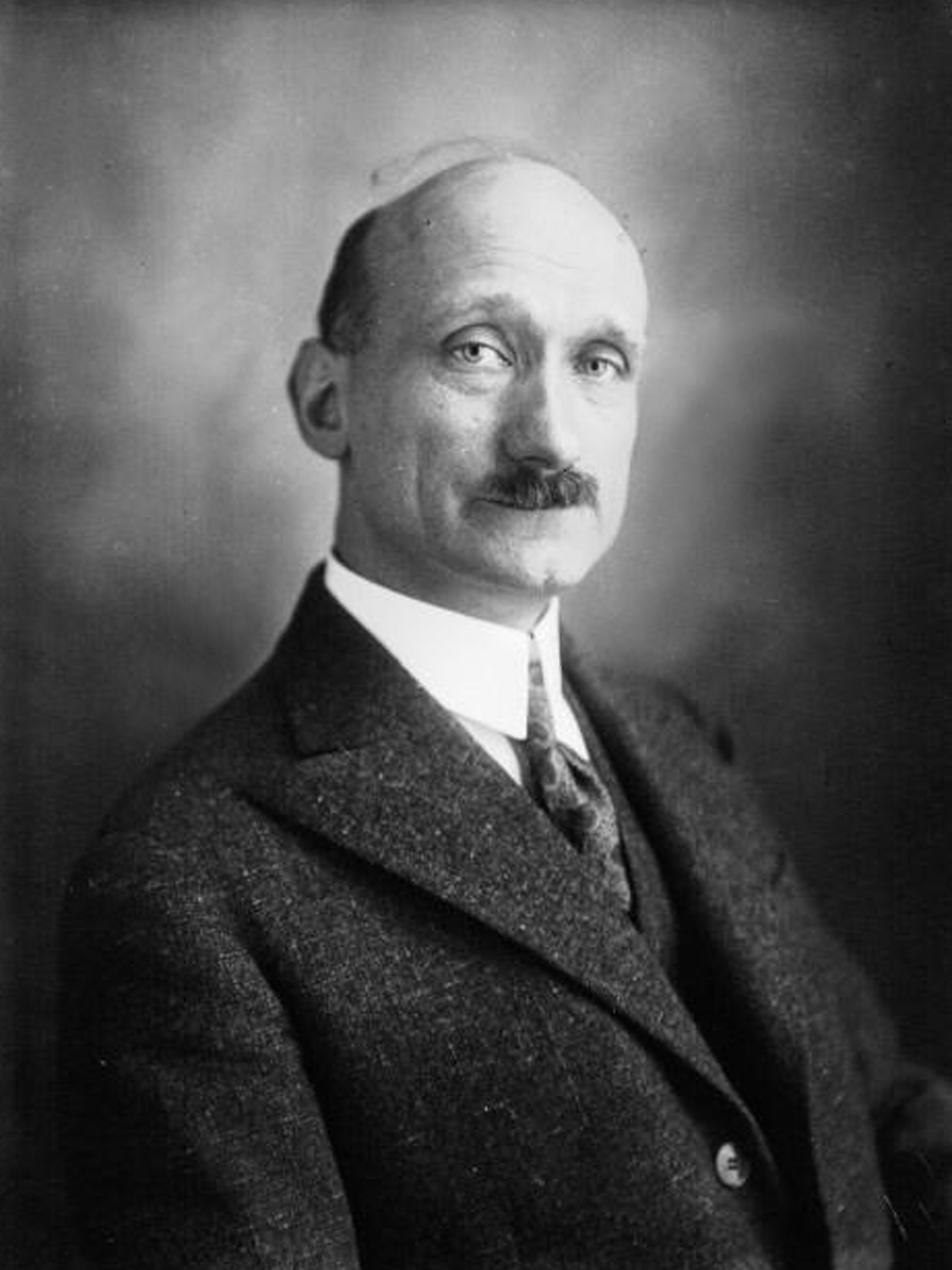 Robert Schuman, député (Moselle). Photographie de presse.